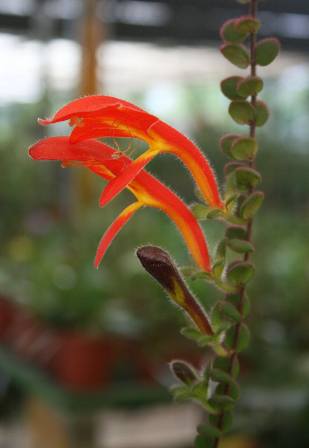 Columnea microphylla, Gesneriengewächse (Gesneriaceae) - Costa Rica: Prov. Cartago, Paraíso, Jardín Botánico Lankester/Lankester Botanical Garden, Orchid greenhouse